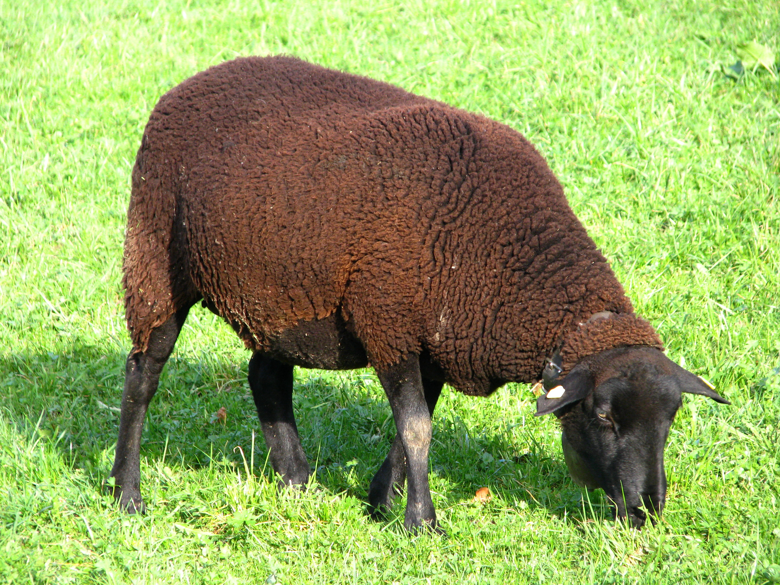 Meienberg in Rapperswil-Jona (Switzerland)